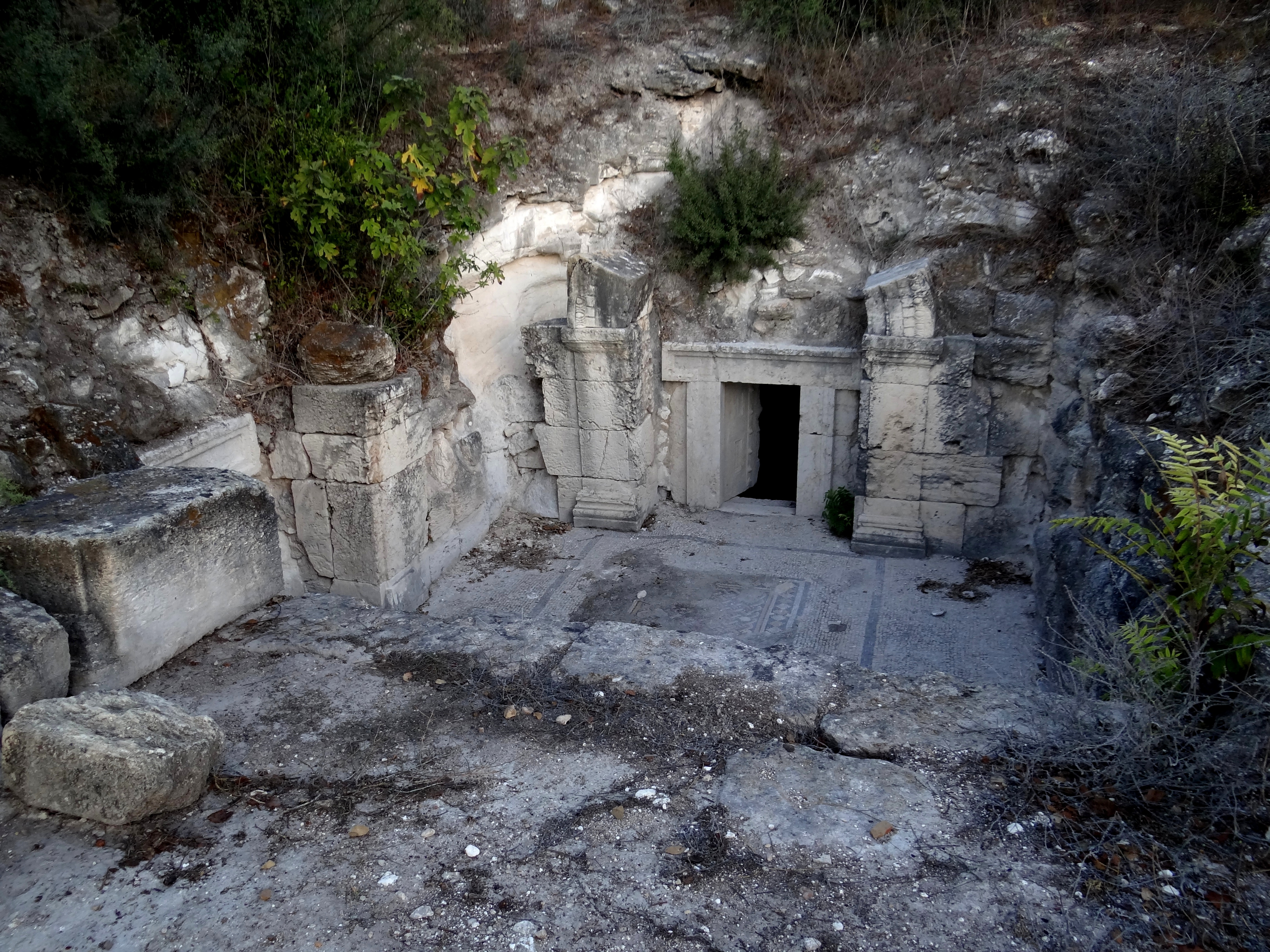 בית שערים הוא אתר ארכאולוגי השוכן בגליל התחתון. במקום התקיים יישוב יהודי חשוב בתקופת בית שני, המשנה והתלמוד. מערת הכוכים היא מערה מספר ,6 נחפרה על ידי בנימין מזר בשנות ה-30 של המאה ה-20. מספרה 6 מעיד עליה שהיא המערה השישית שנחפרה. מערה זאת היא חלק ממתחם מערות המנורה, אבל שוכנת בחלק שאינו מגודר, אלא במעלה הרכס ממול למתחם הסגור. שמה של המערה ניתן לה בעקבות ריבוי הכוכים הנמצאים בה.